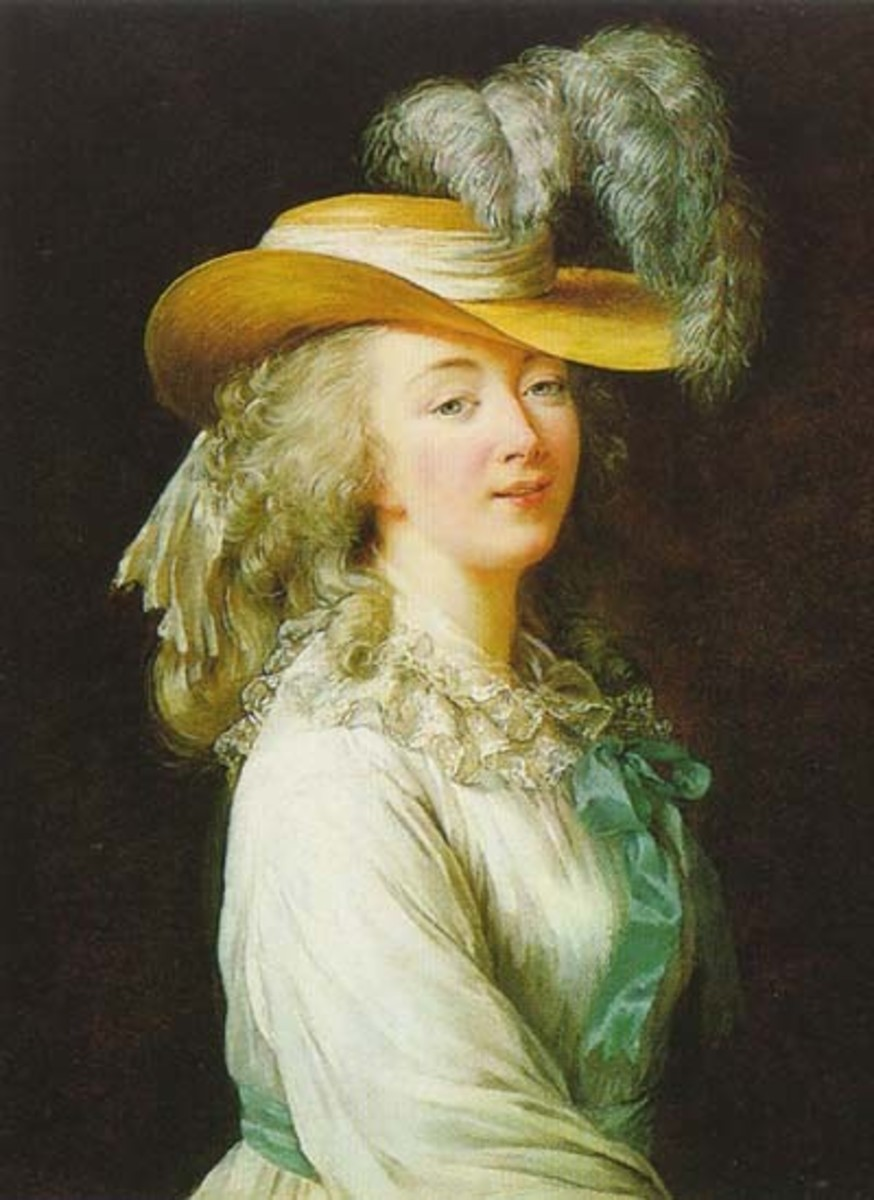 Élisabeth Vigée-Lebrun (1755–1842): Marie-Jeanne Bécu, comtesse du Barry (1743–1793), 1781. Öl auf Holz, 69.2 × 51.4 cm. Philadelphia Museum of Art, Inv-Nr. 1984-137-1.